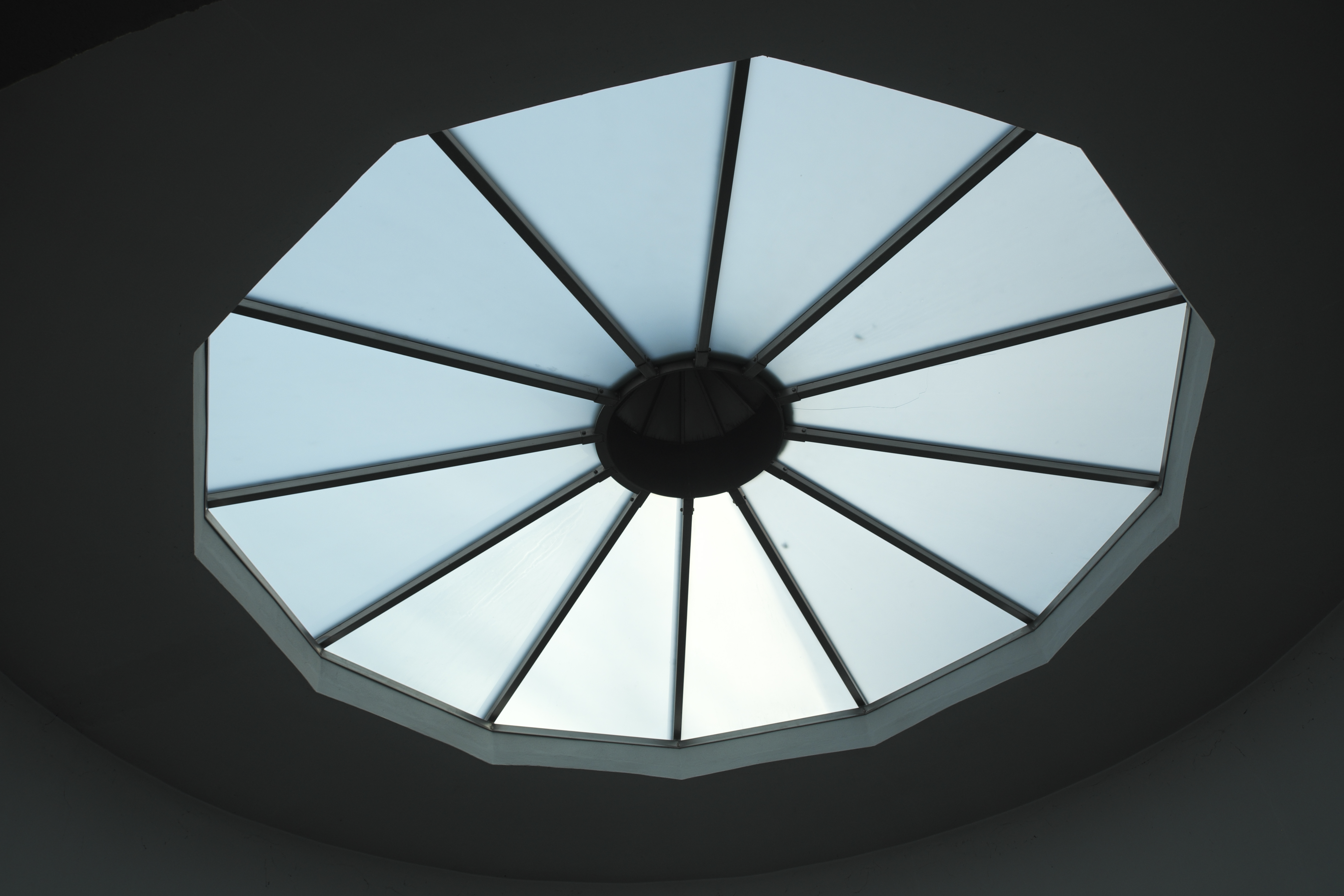 Wasserwerk Pasing, Planegger Straße 150, in Pasing im Stadtbezirk Pasing-Obermenzing in München (Bayern/Deutschland)